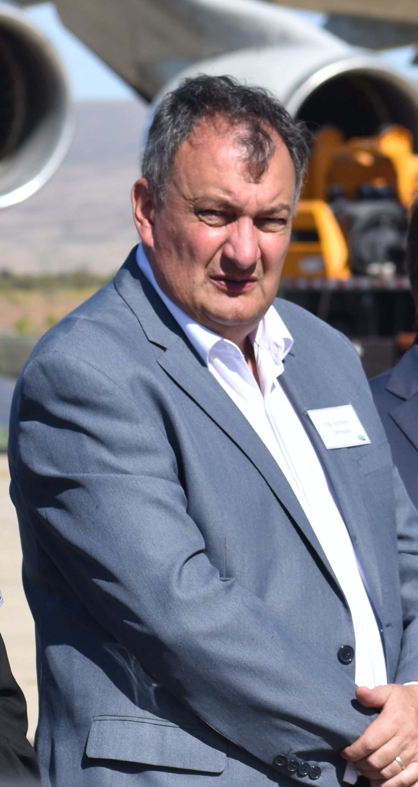 Acto de la carga del satélite SAOCOM 1B en el interior del Antonov An-124-100 RA-82046 de Volga Dnepr Airlines para su entrega en Cabo Cañaveral. Con presencia de Giuseppe Manzo, Vicente Campenni, Raúl Kulichevsky, Silvina García Larraburu, Gustavo Gennuso, Arabela Carreras, Roberto Salvarezza, Santiago Cafiero, Miguel Cuberos. Micaela Sánchez Malcolm, Martín Soria y Luis Di Giacomo.